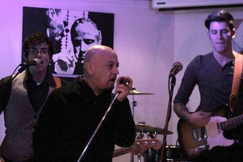 The Bankrobber live con Enrico Ruggeri